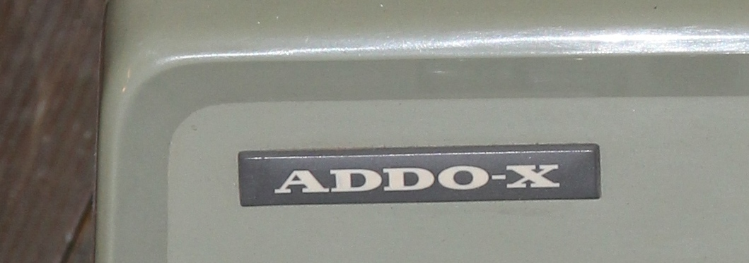 Gerätename ADDO-X des Tischrechners der Firma AB Addo.Typografie von Ladislav Sutnar